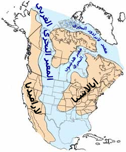 خارطة لِأمريكا الشماليَّة تُظهرُ الممرَّات البحريَّة الداخليَّة الضحلة التي كانت موجودة في مُنتصف العصر الطباشيري.